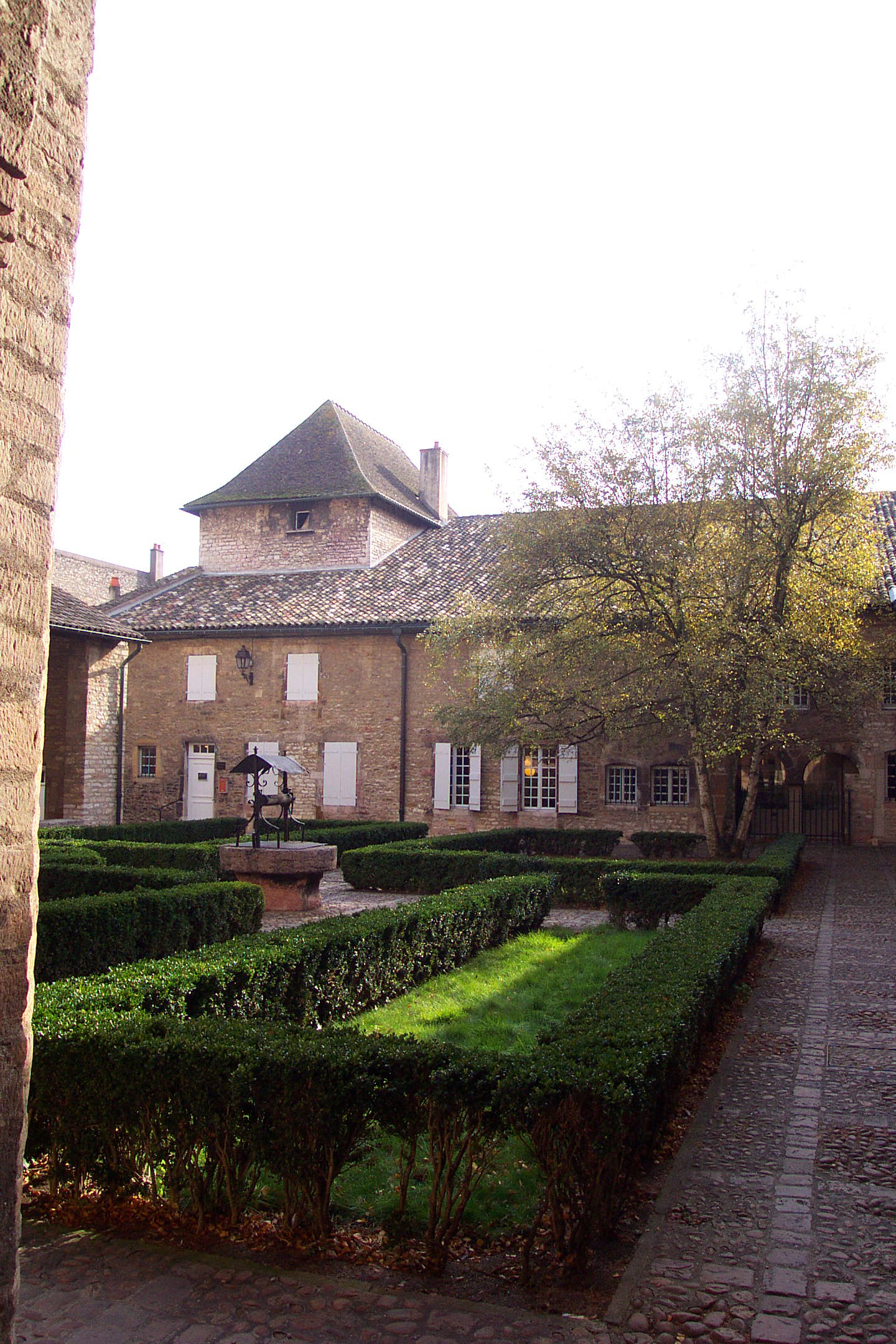 Édifiée au XIe et XIIe siècles l'abbaye de Saint-Philibert est l'un des fleurons de l'architecture romane de Bourgogne.